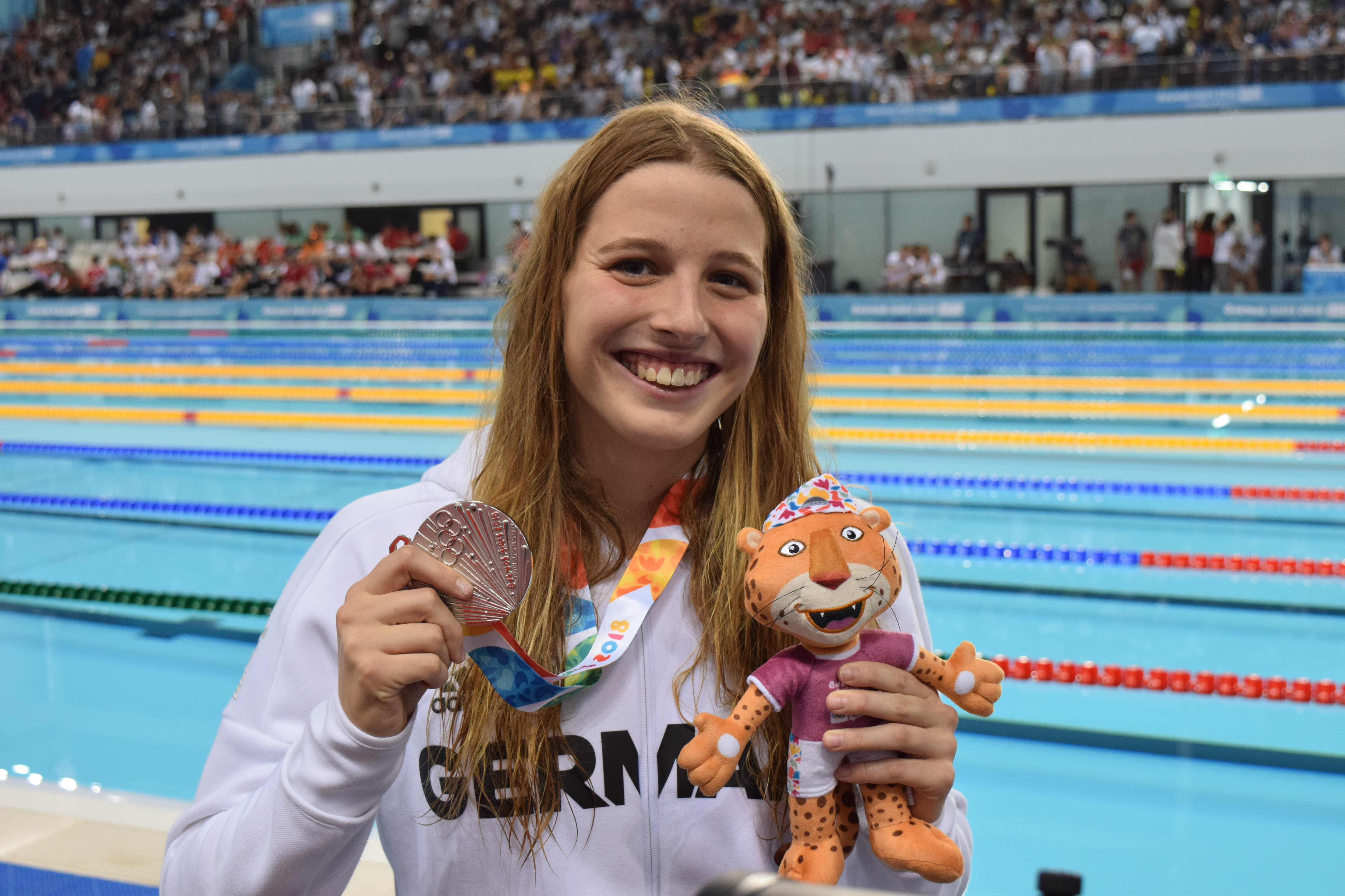 Finales de natación , durante los Juegos Olímpicos de la Juventud 2018 en Buenos Aires. Tarde del 12 de octubre. Angelina KOEHLER.